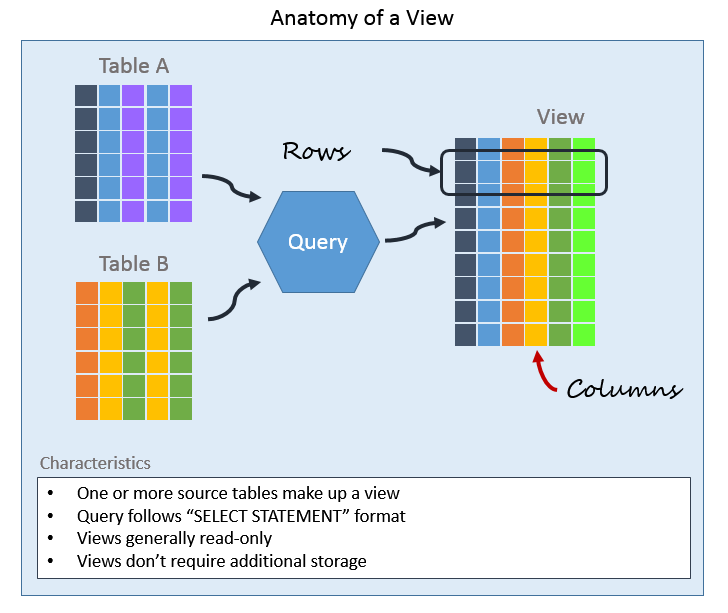 Монгол: view example